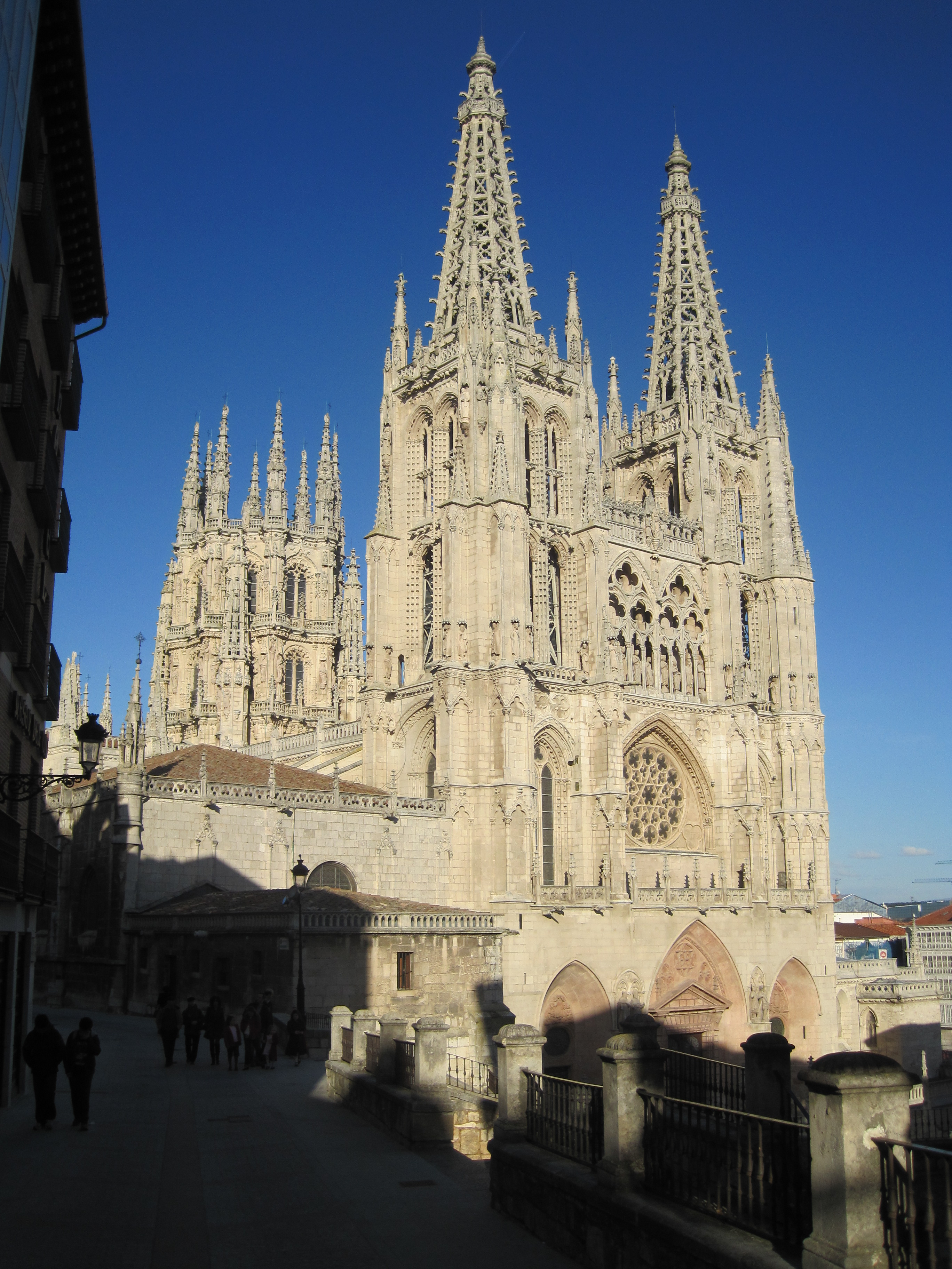 Vista desde el Mesón del Cid de la Catedral.